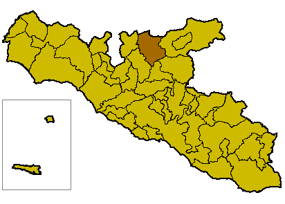 Locatie van Santo Stefano Quisquina